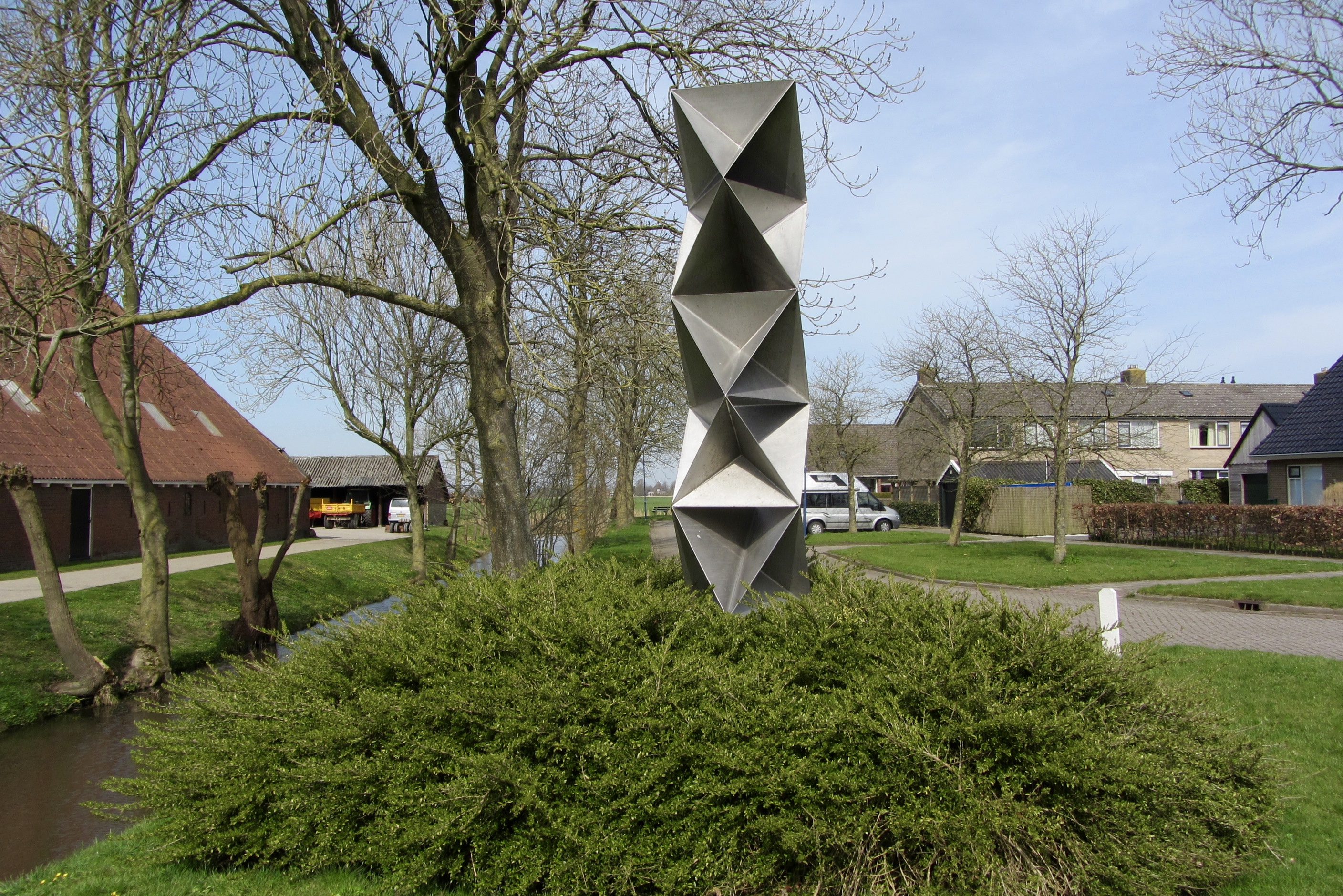 Harmen Abma, 1969